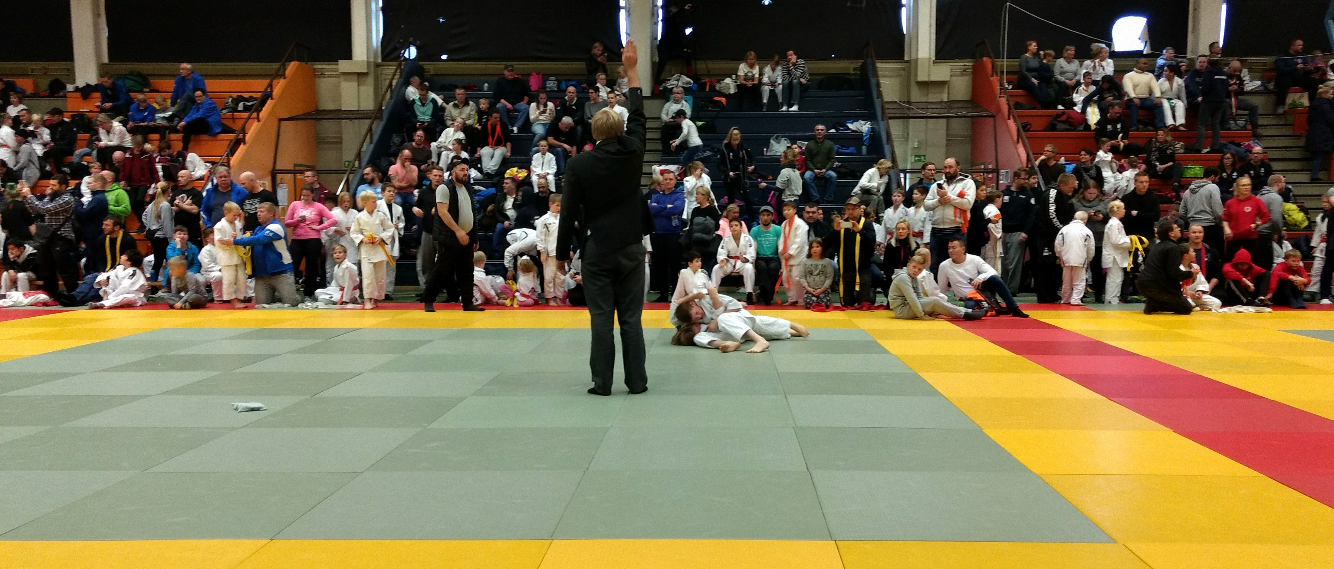 Ippon! Tuomari julistaa ottelun päättyneeksi. Kuvassa eri ottelualueiden turva-alueet eivät taida olla ihan sääntöjen mukaiset edes kotimaan näkövinkkelistä.